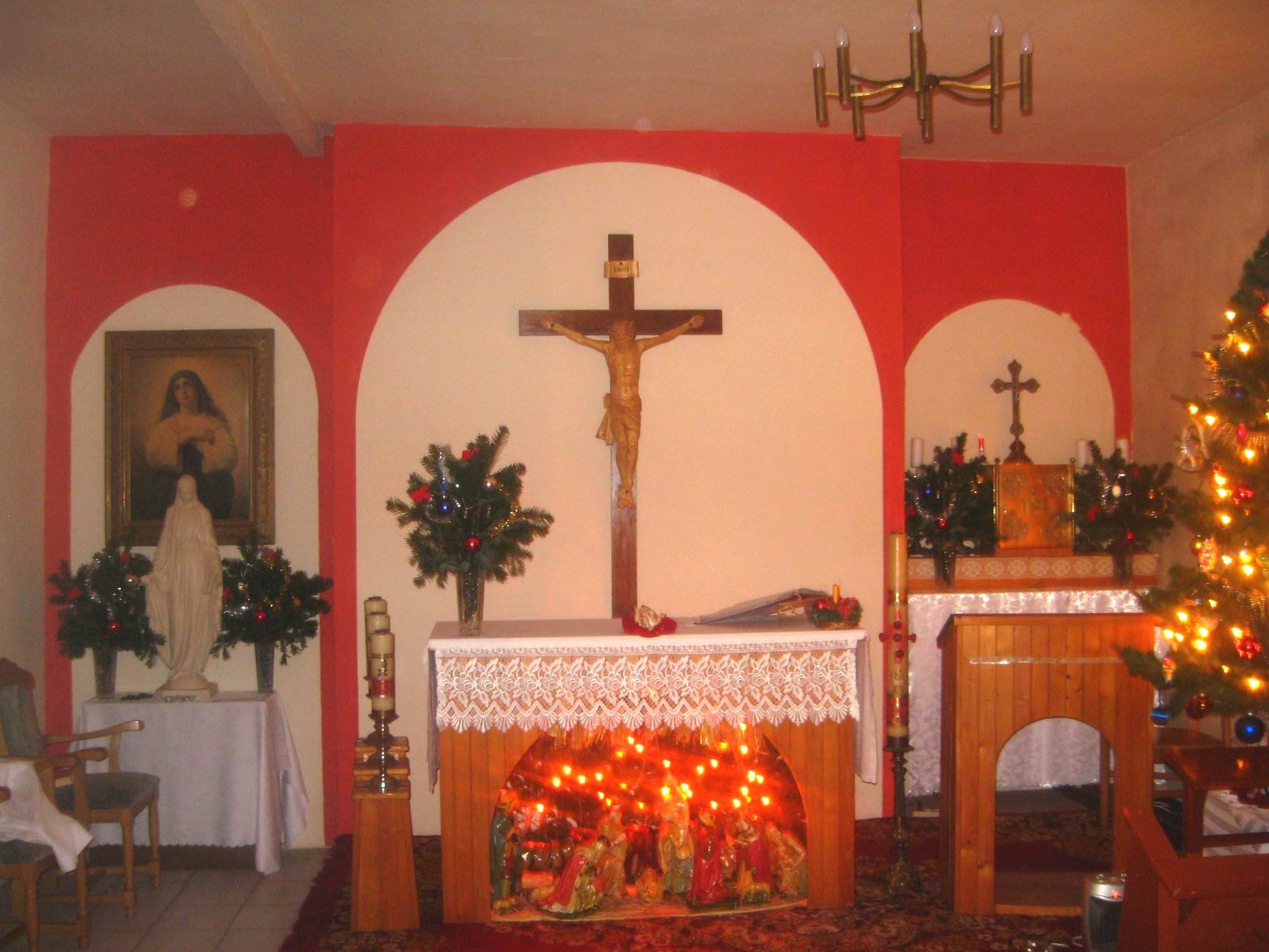 Polskokatolicy Miechowity